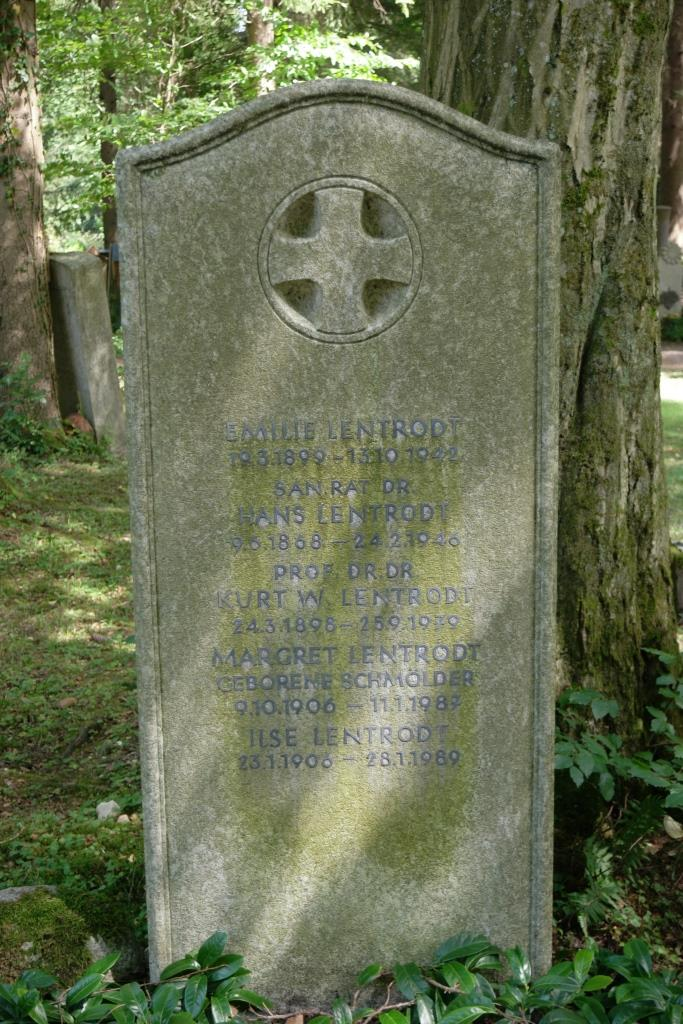 Grab des Mediziners Kurt Wilhelm Lentrodt, 1898-1979, auf dem Waldfriedhof in München-Solln